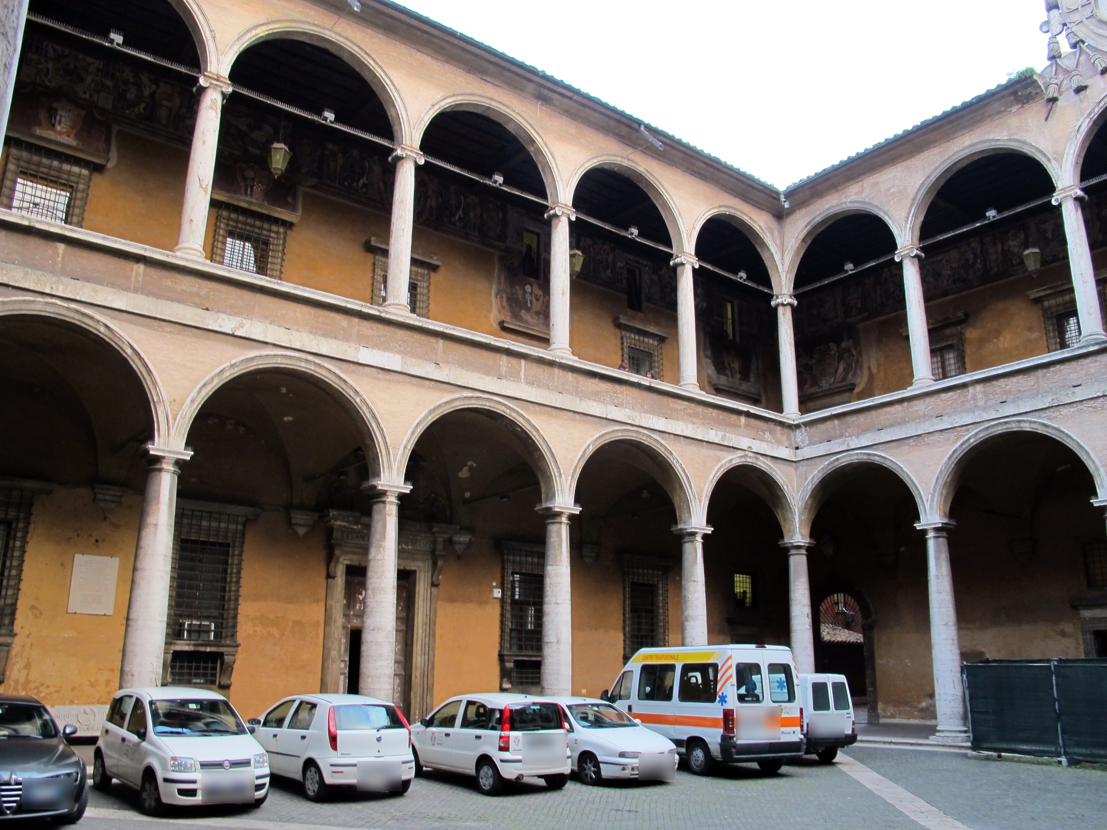 Santo Spirito in Saxia, Roma